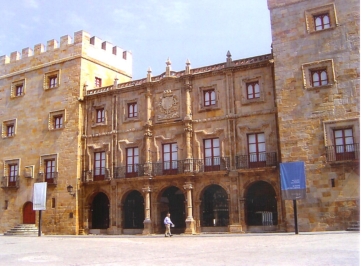 Gijón.